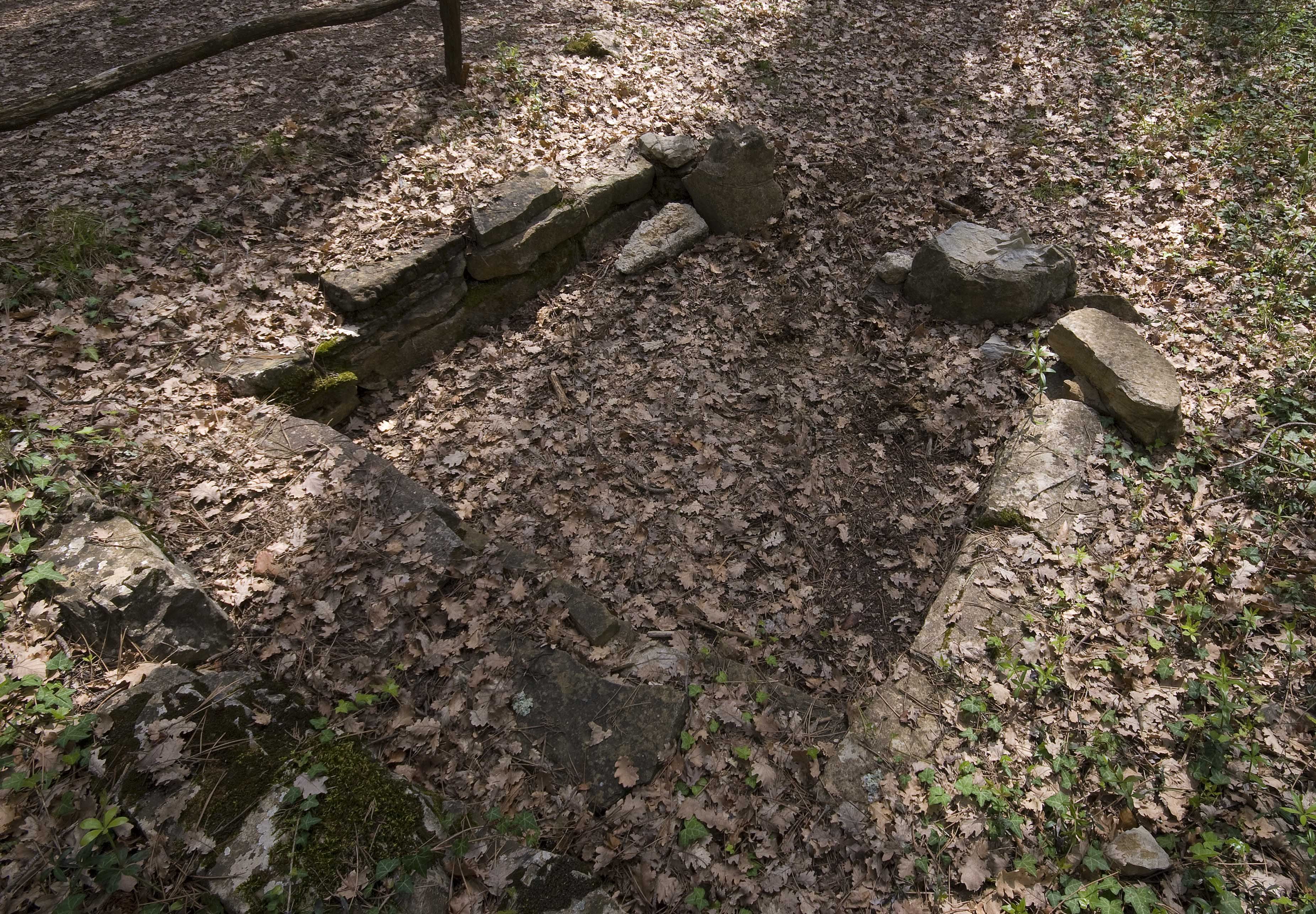 Necropoli del Poggino tomba 2